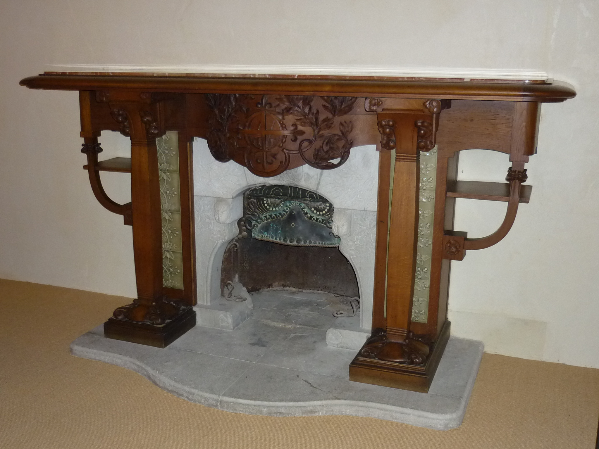 Decoració dels interiors de la casa pairal de D. Pompeyo de Quintana